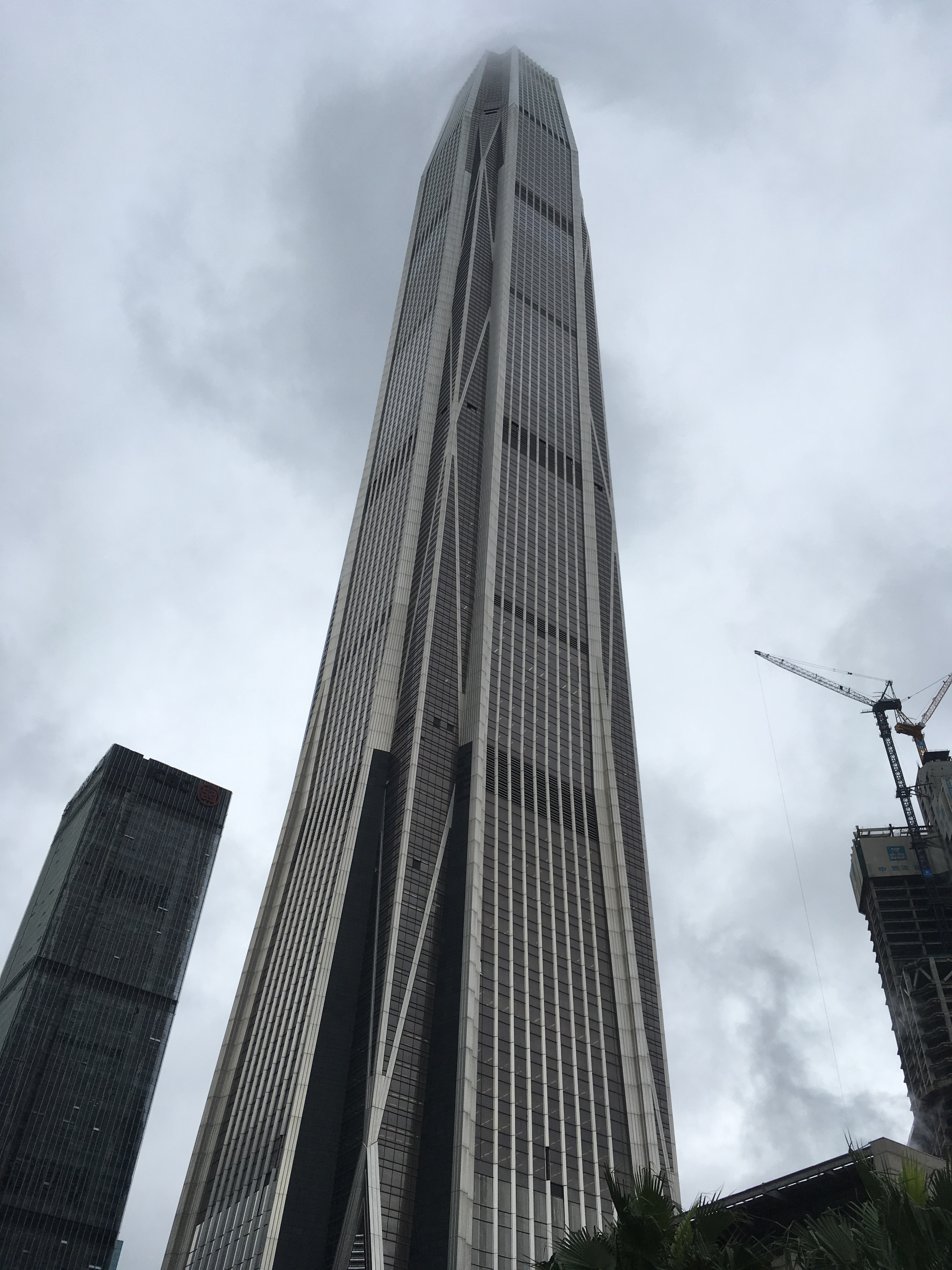 中文（中国大陆）: 平安国际金融中心